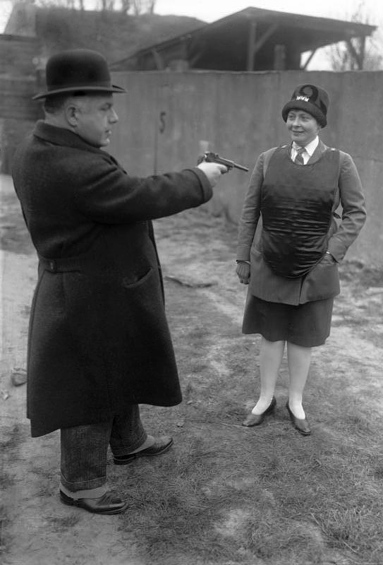 Ein kugelsicherer Schutzpanzer ! Der Kugelschutzpanzer ist eine deutsche Erfindung und wird von der Berliner Kriminalpolizei bei Kämpfen mit Verbrechern getragen. Schüsse aus 1 m Entfernung prallen wirkungslos an diesem Panzer ab.